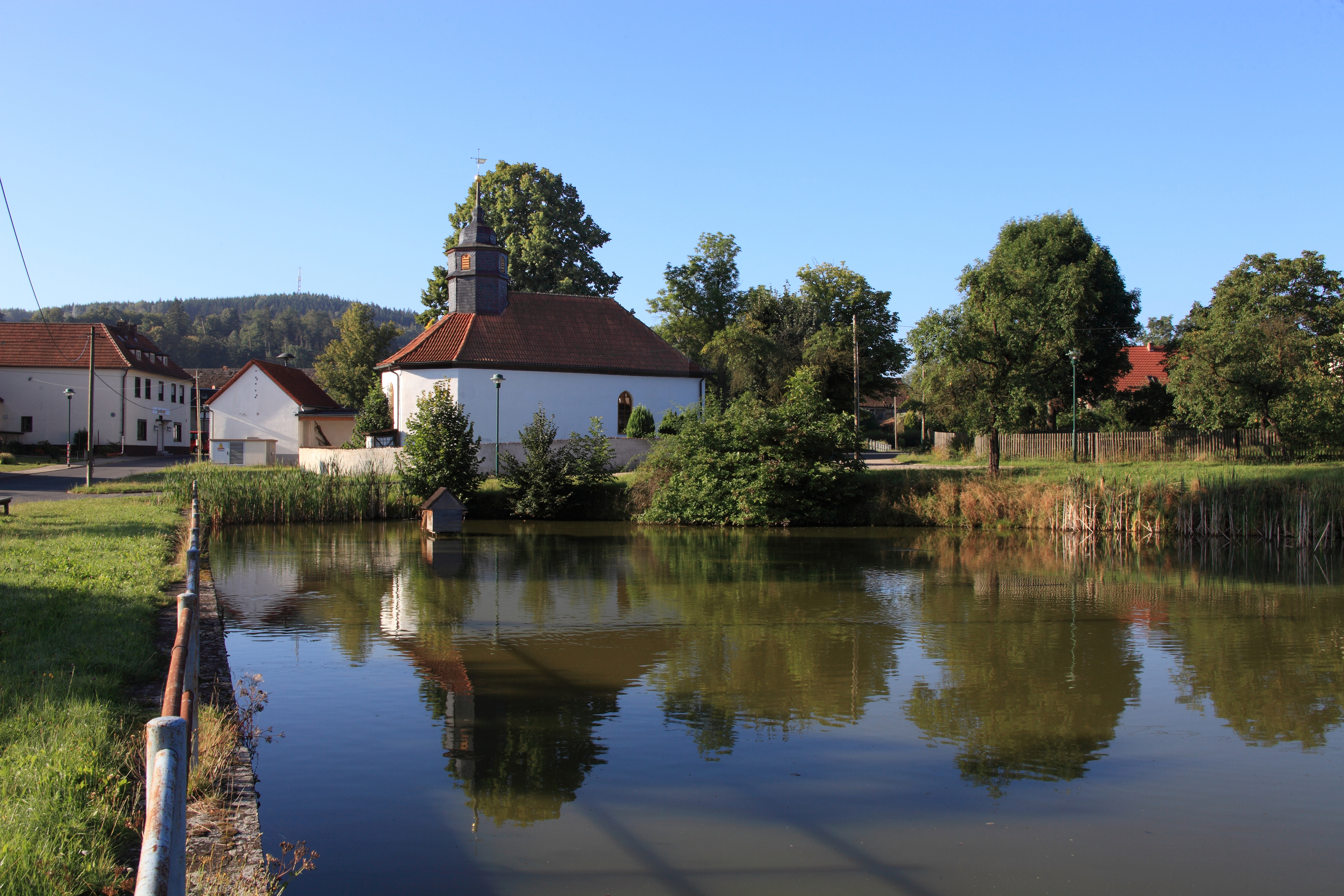 Dorfteich mit Kirche in Neidenberga